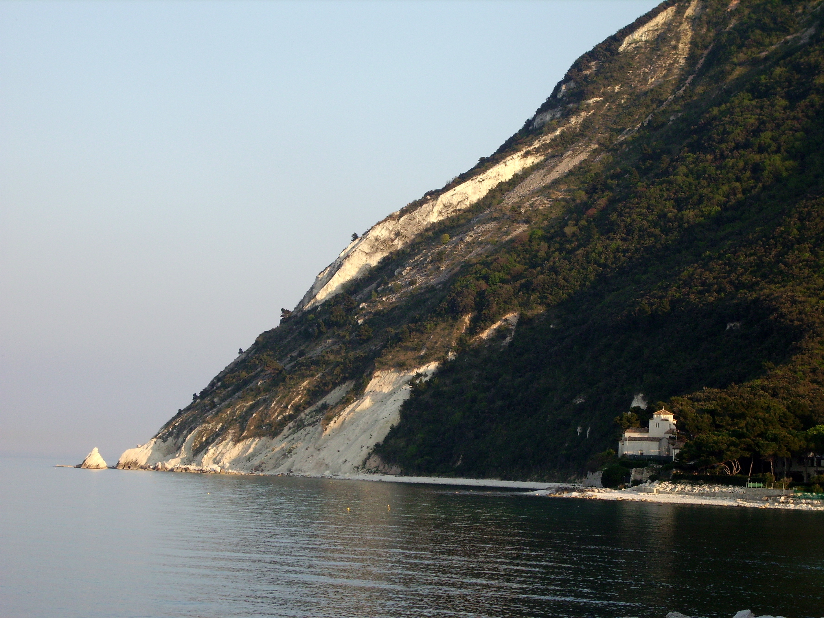 La chiesetta di Portonovo di Ancona immersa nel verde del monte Conero.